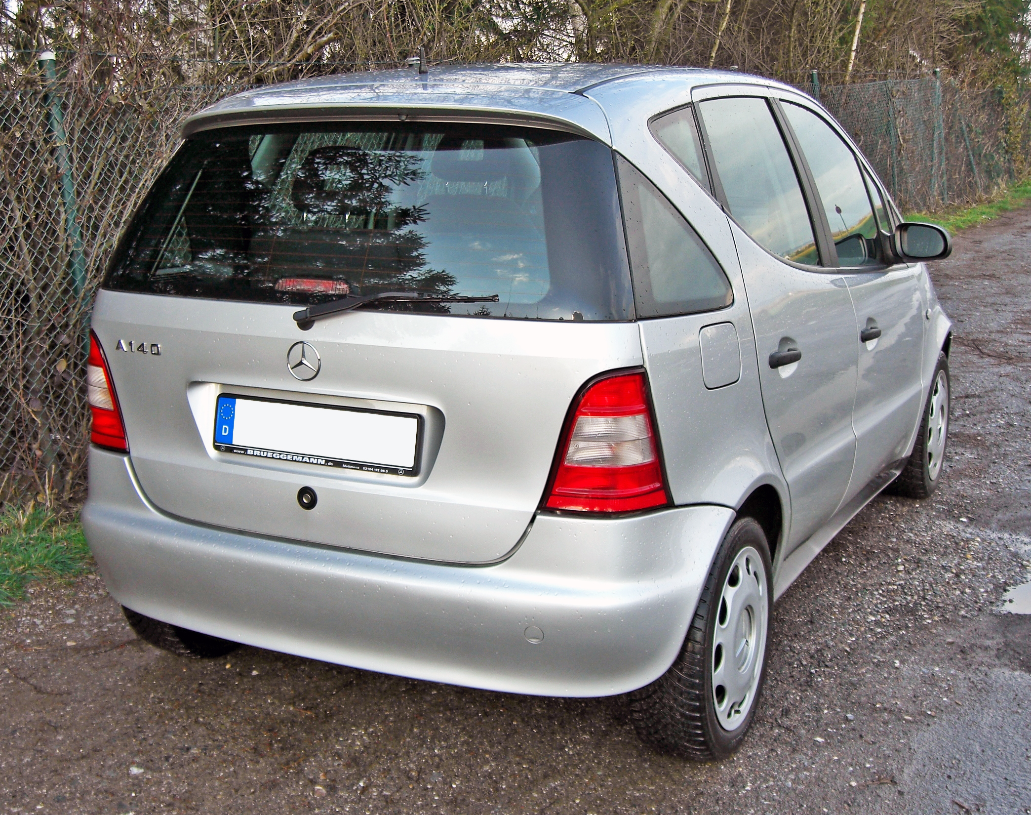 Mercedes A 140 Classic Fun